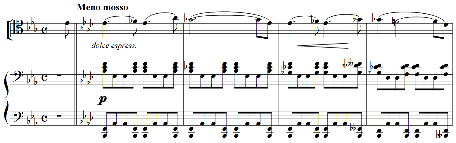 Louis Vierne : Quintette pour piano et cordes, op.42, 1er mouvement, thème principal au violoncelle et piano